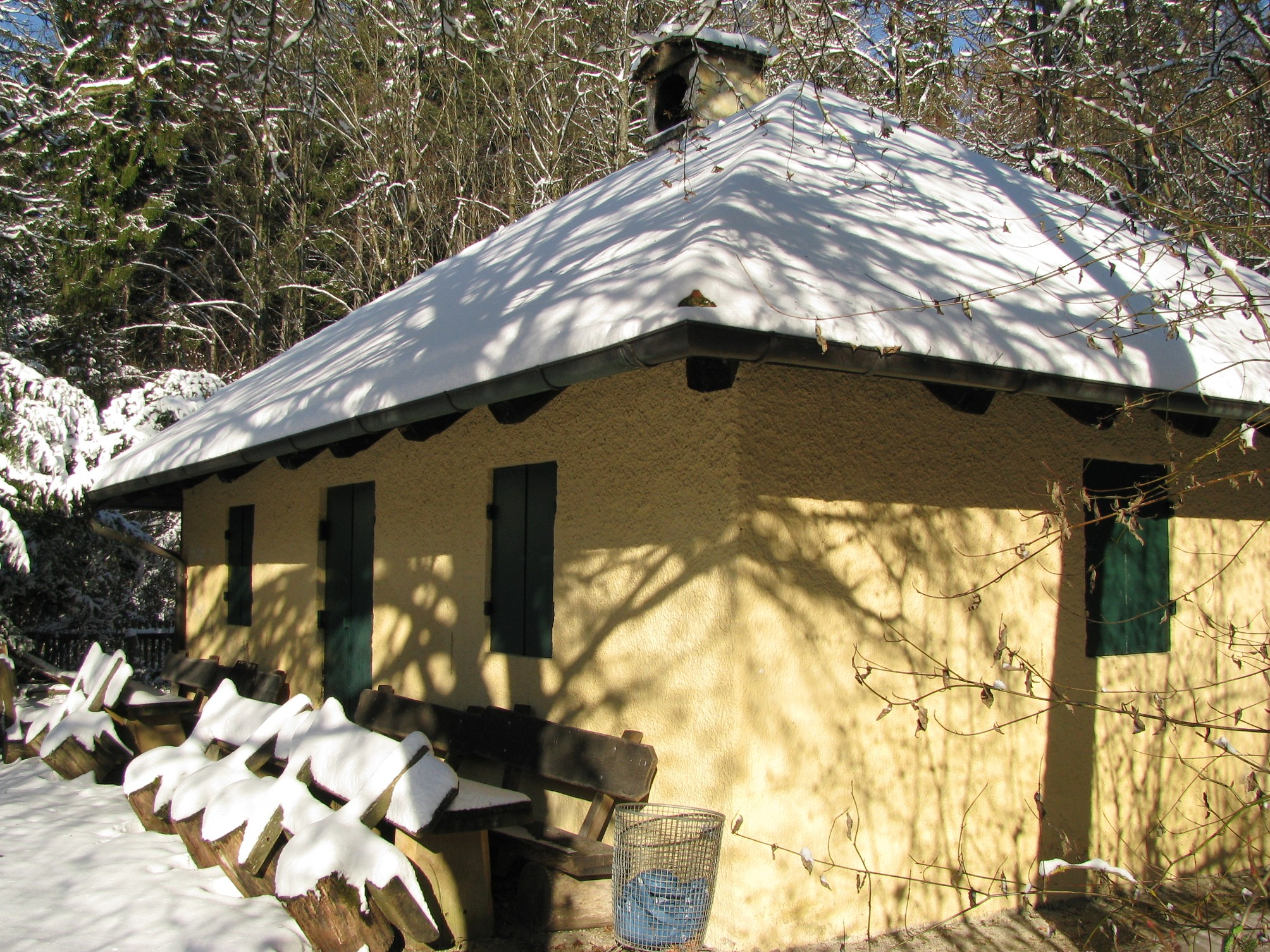 Gelbes Haus im Forstenrieder Park an der Kreuzung von Ludwigsgeräumt mit dem Karolinengeräumt